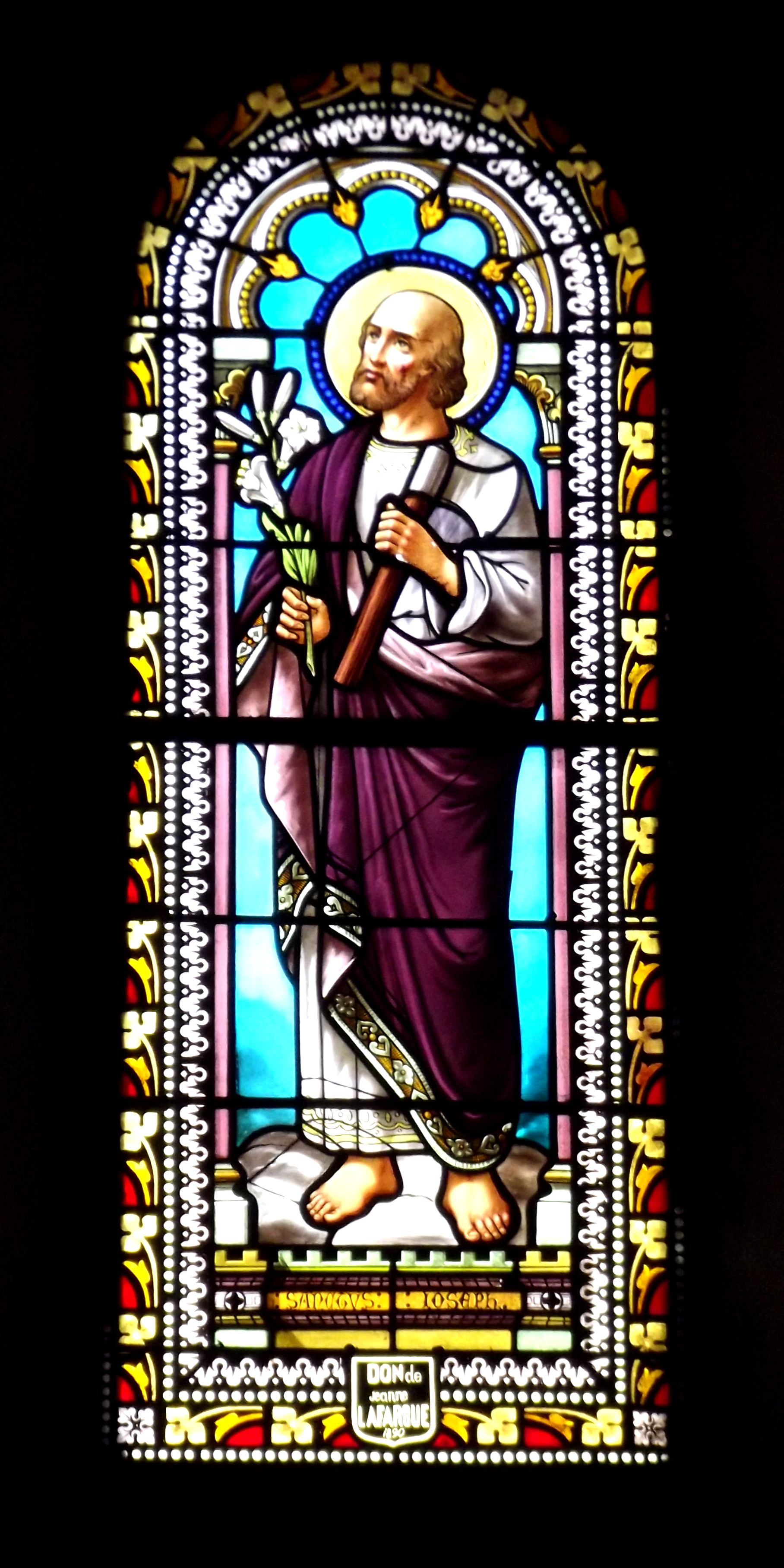 Église du XIVe restaurée au XVIIIe